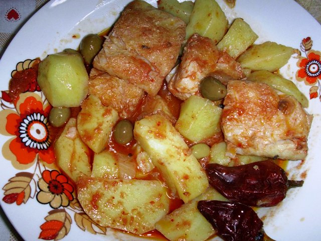 Autore: Gino Larosa OTRS: 2008021510007787